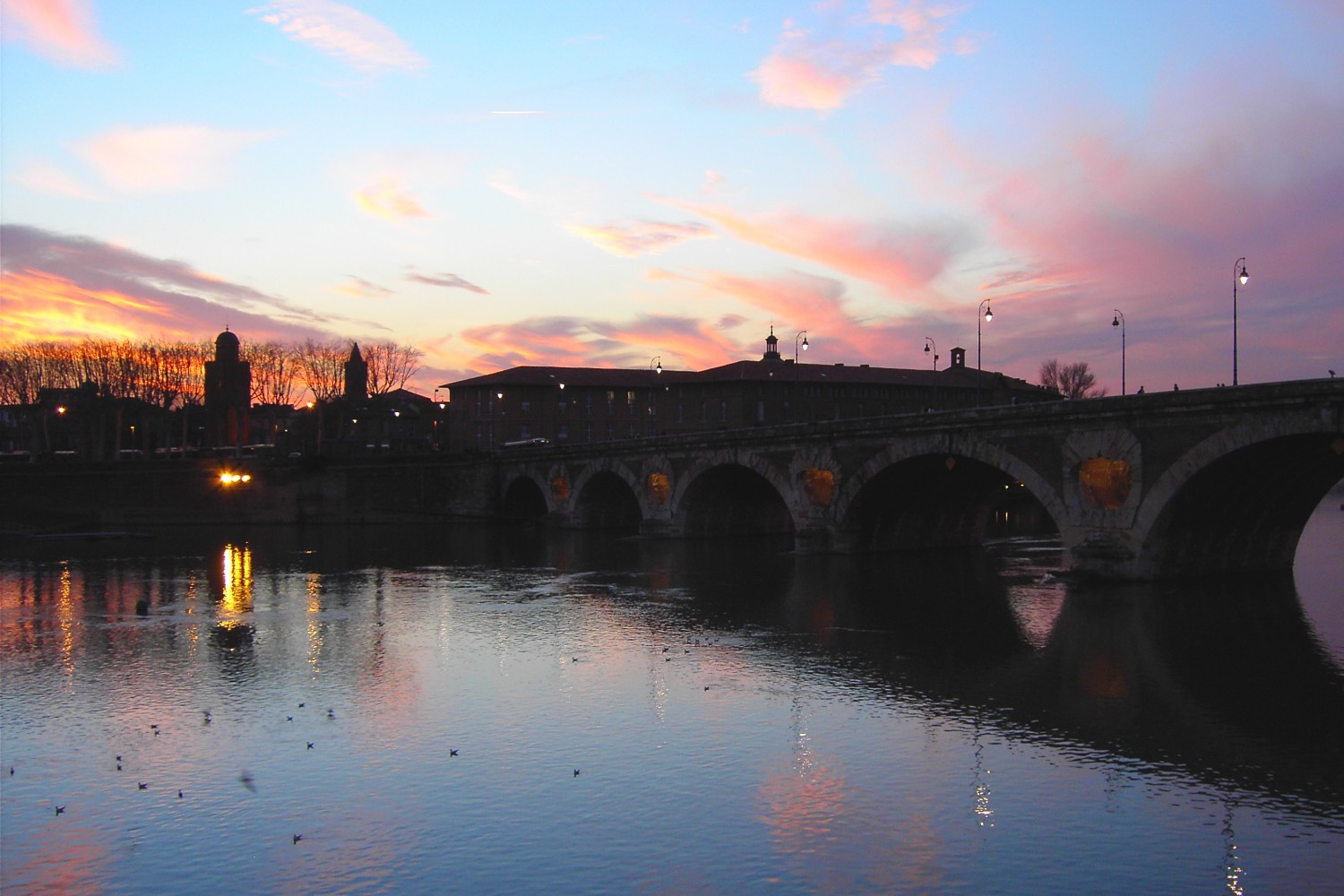 Toulouse : Coucher de soleil sur Saint-Cyprien. Vue sur la Garonne, le Pont Neuf, l'Hôtel Dieu, le Chateau d'eau.